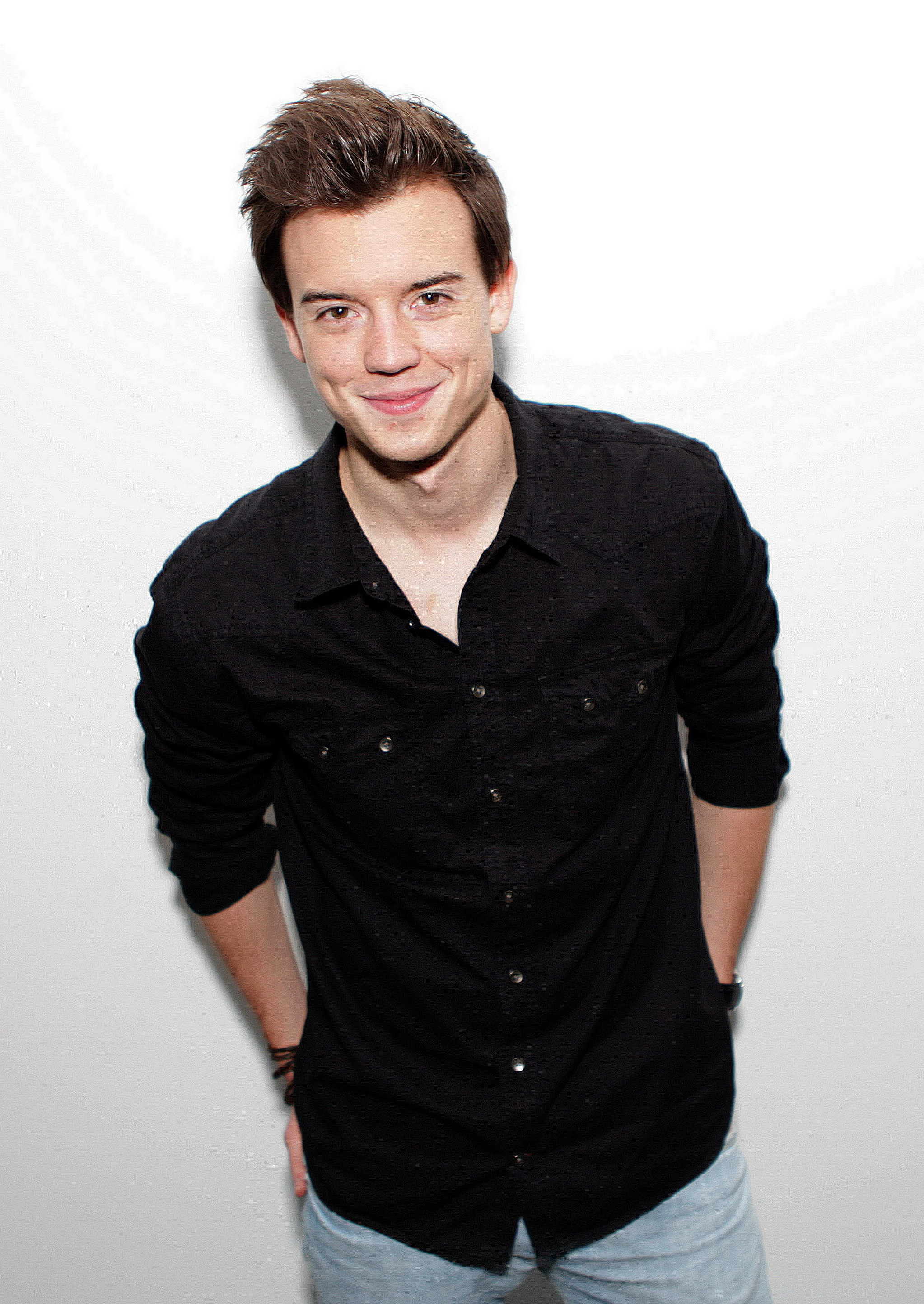 Philipp Hansa (2015) cropped